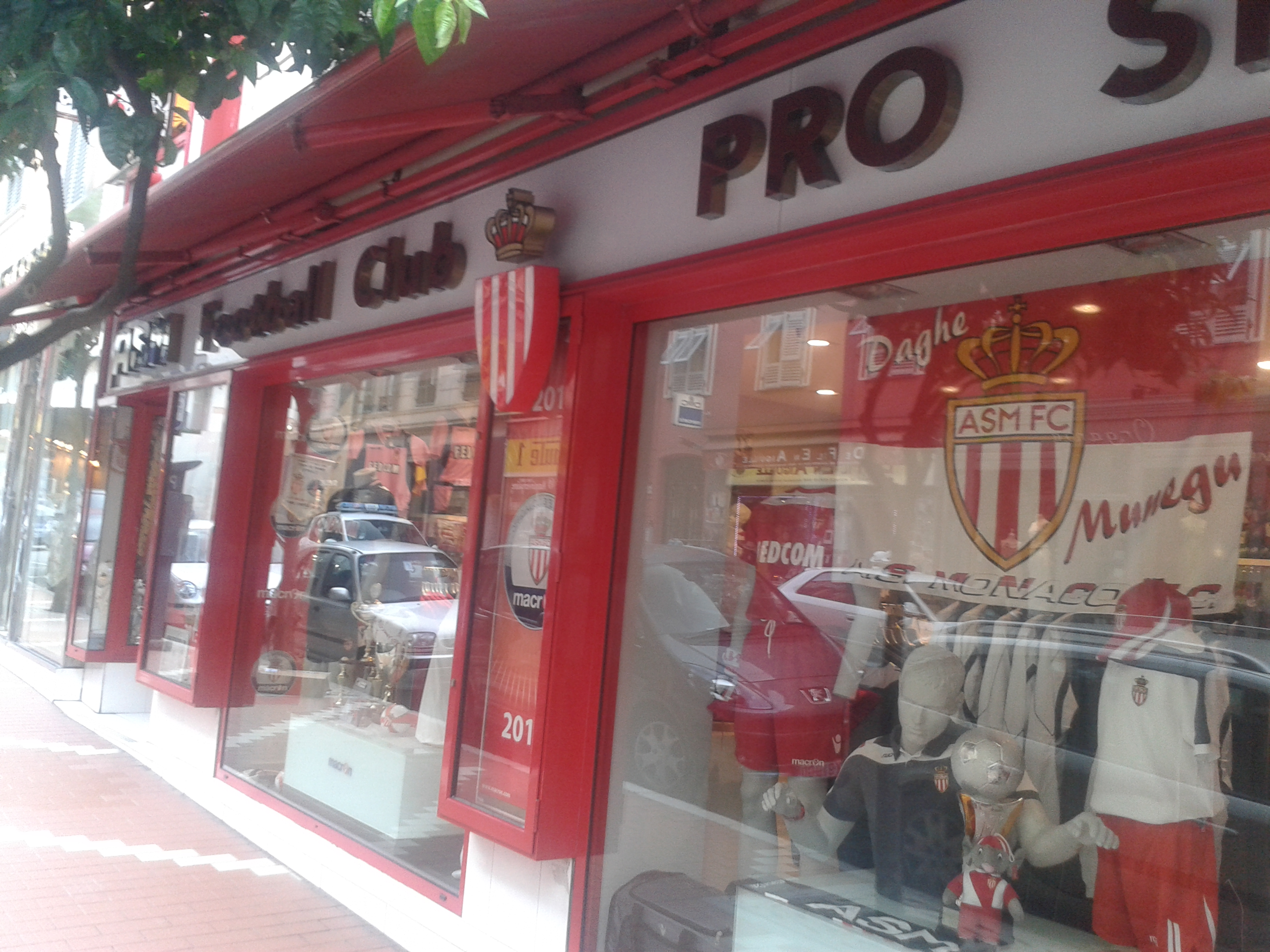 Façade de la boutique officielle de l'AS Monaco, club de football français, le 17 juillet 2013